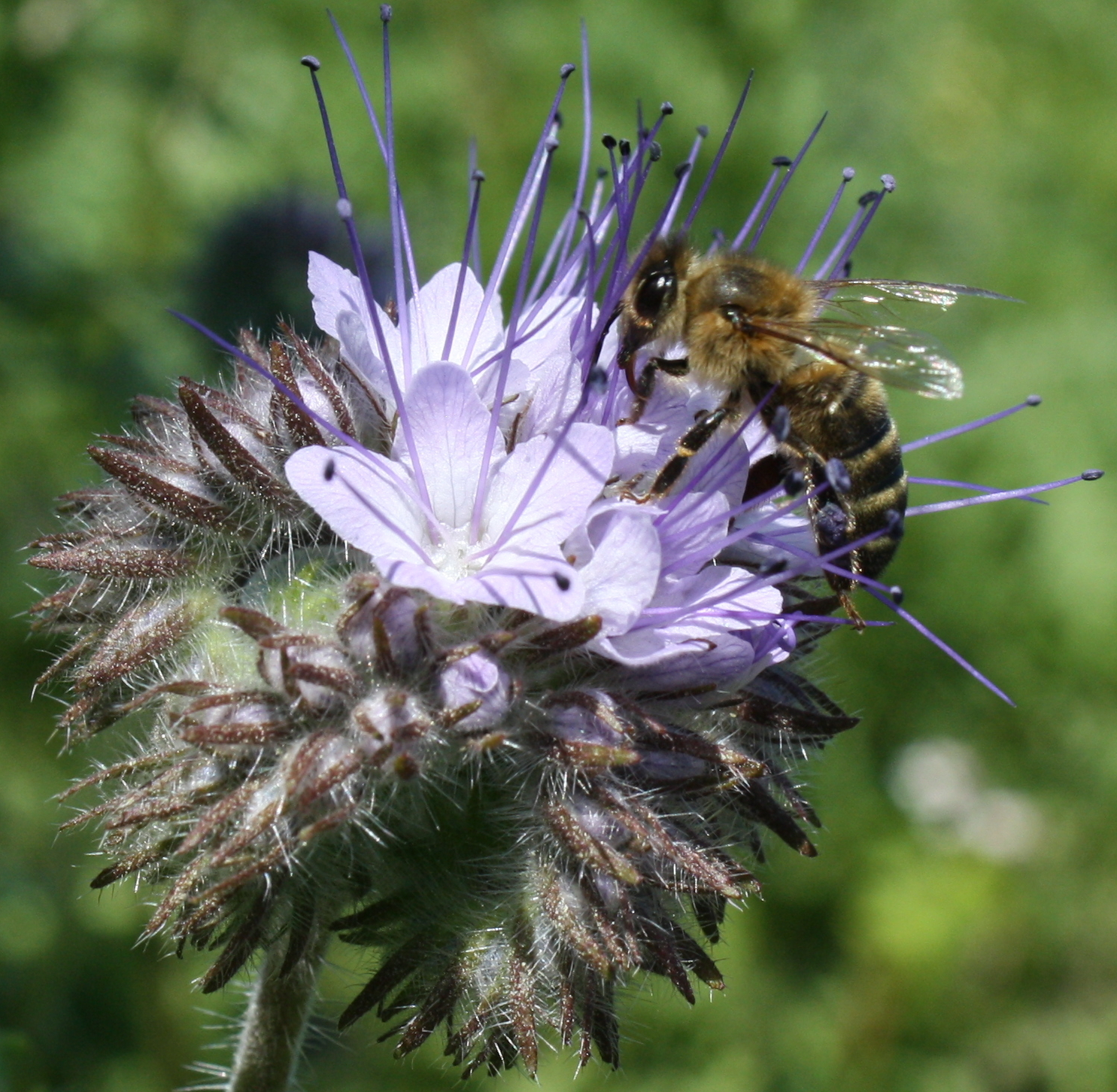 Biene und Phacelia